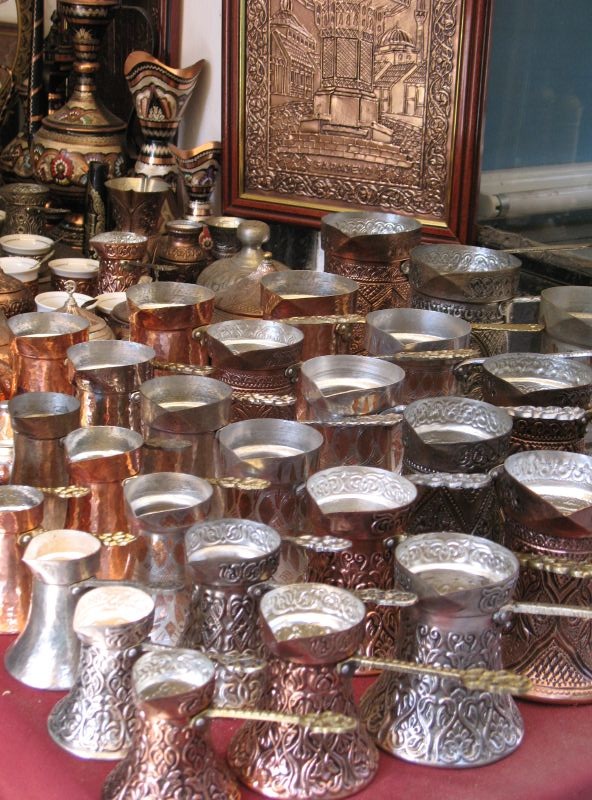 Koffiepotten